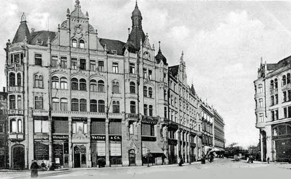 Das Hirzelhaus am Leipziger Burgplatz, 1943 durch Bomben zerstört